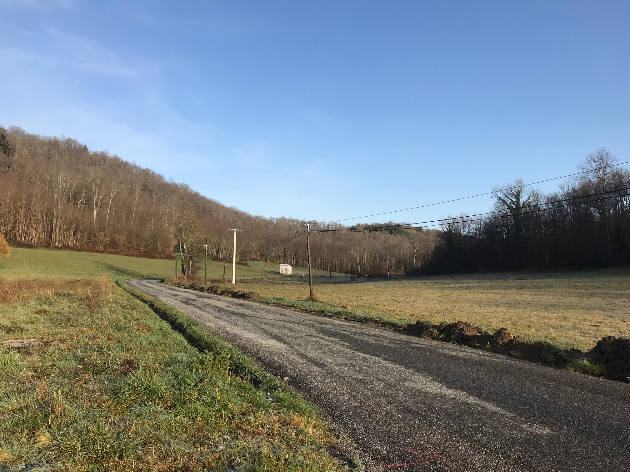 Le col de Sarnac (ou de la Chioulade), versant nord (Ariège, France).